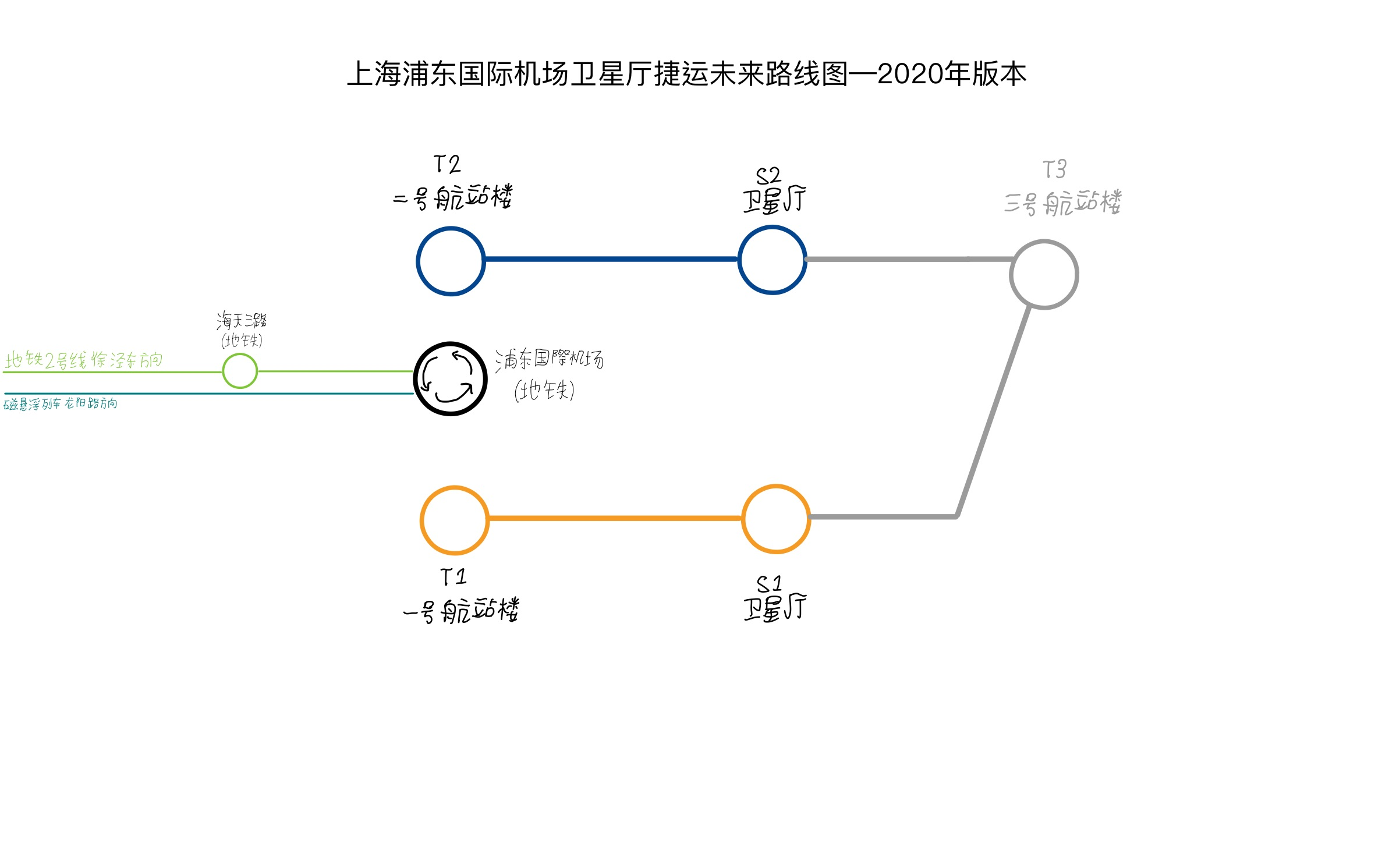 中文（中国大陆）: 上海浦东国际机场卫星厅捷运路线图—2020年版本